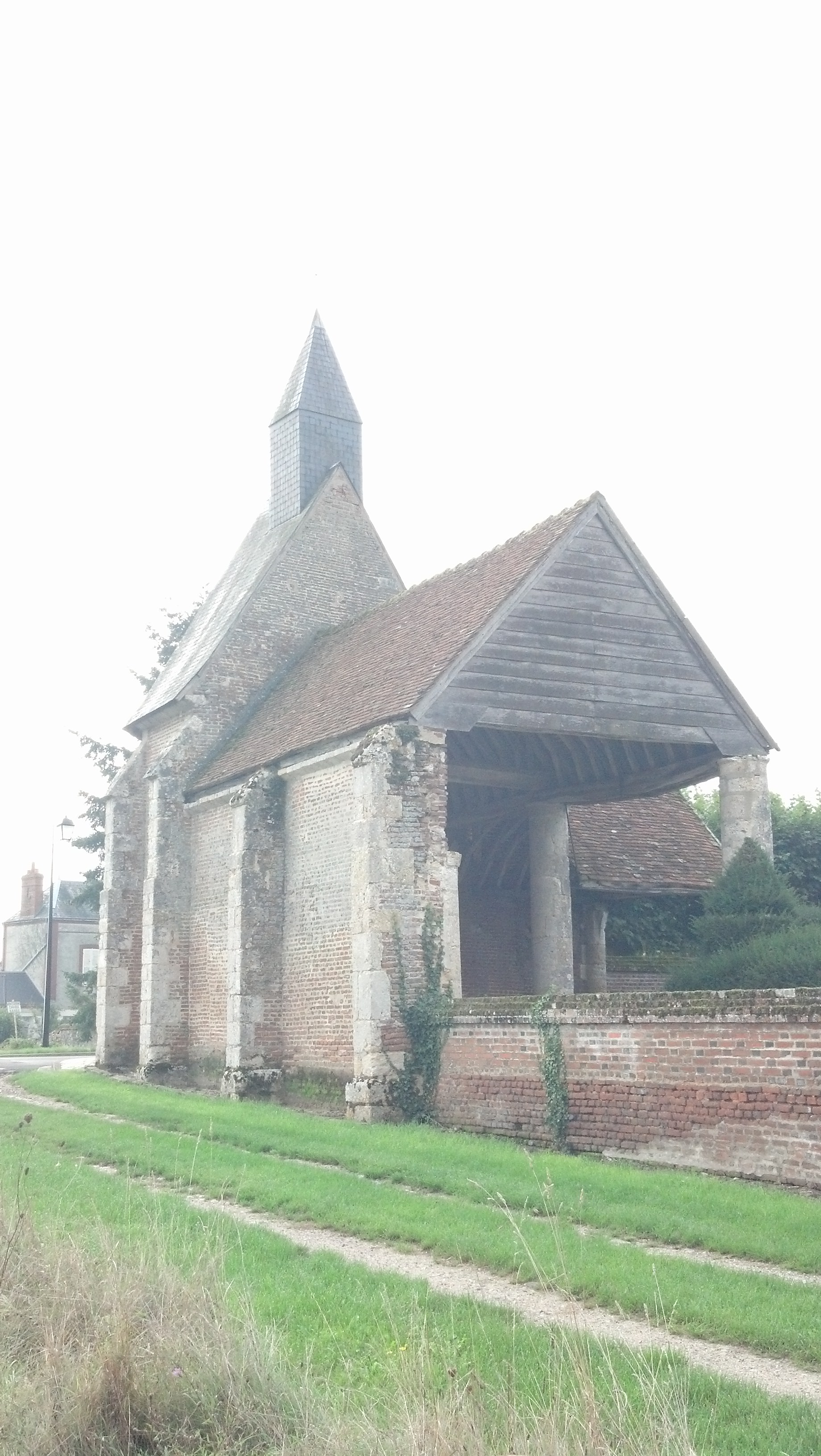 Chapelle Saint-Lazare de Boiscommun .